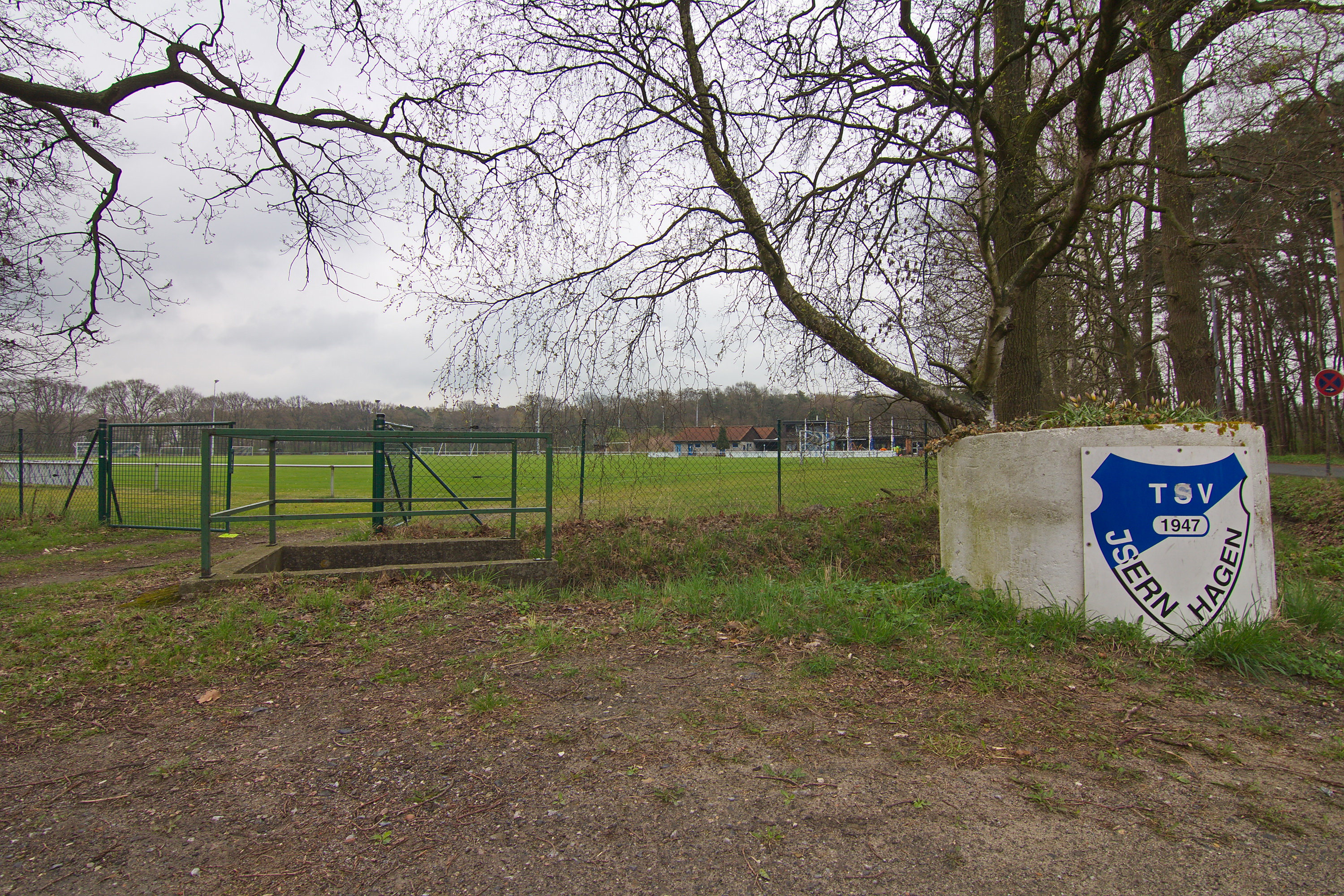 Sportplatz des TSV Isernhagen in Isernhagen HB, Niedersachsen, Deutschland.